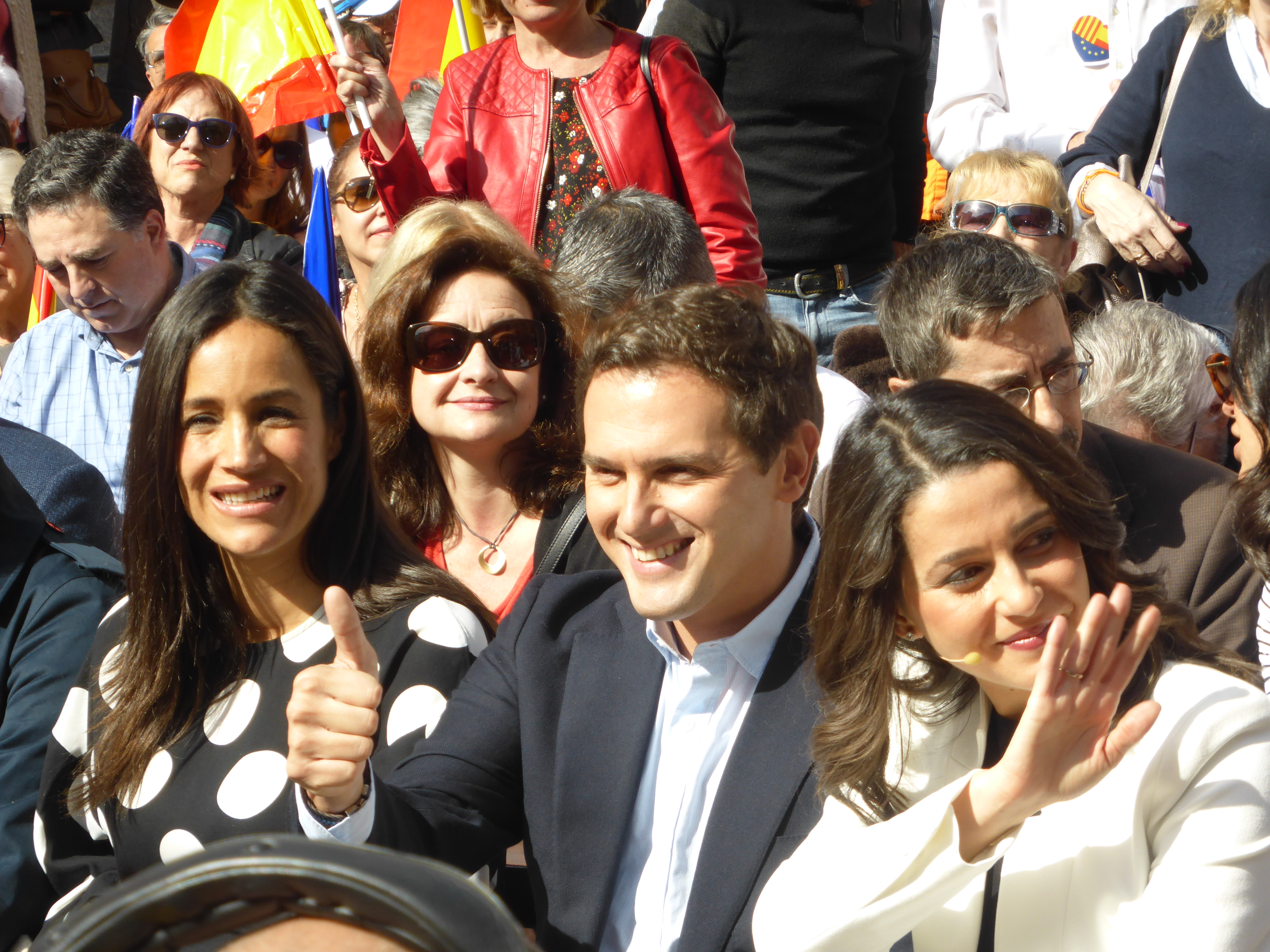 En la Plaza de la Villa, en Madrid, en un acto organizado por el partido Ciudadanos. La política catalana constitucionalista Inés Arrimadas, a la derecha de la foto, poco antes de anunciar su presentación a las elecciones generales del 28 de abril de 2019, por Barcelona.